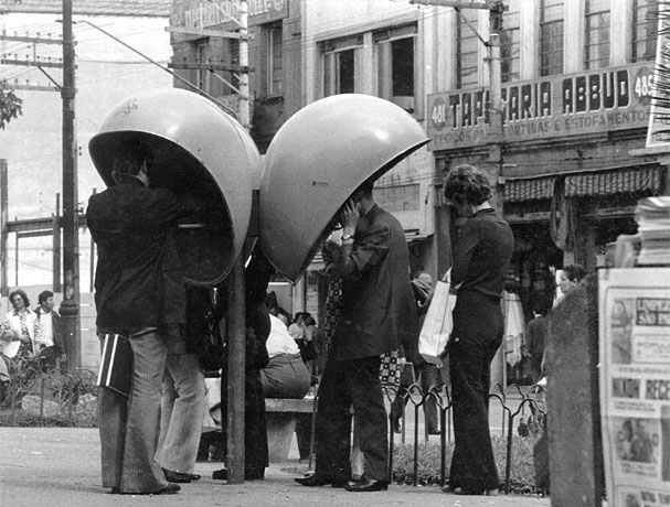 Orelhão triplo ou tulipa em São Paulo